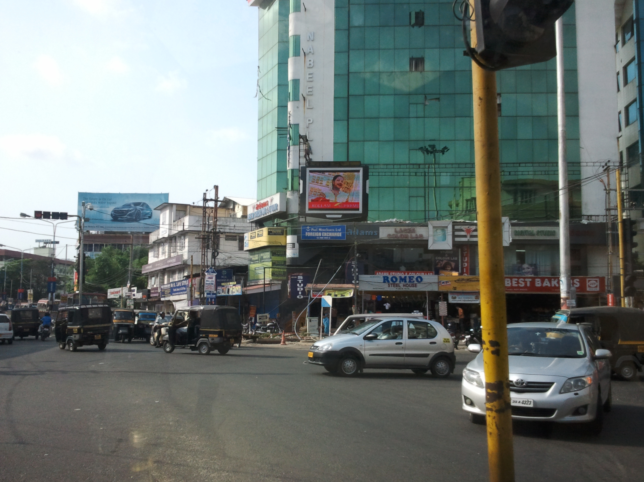 എറണാകുളം എം. ജി. റോഡ്, മെഡിക്കൽ ട്രസ്റ്റ് ജങ്ഷൻ